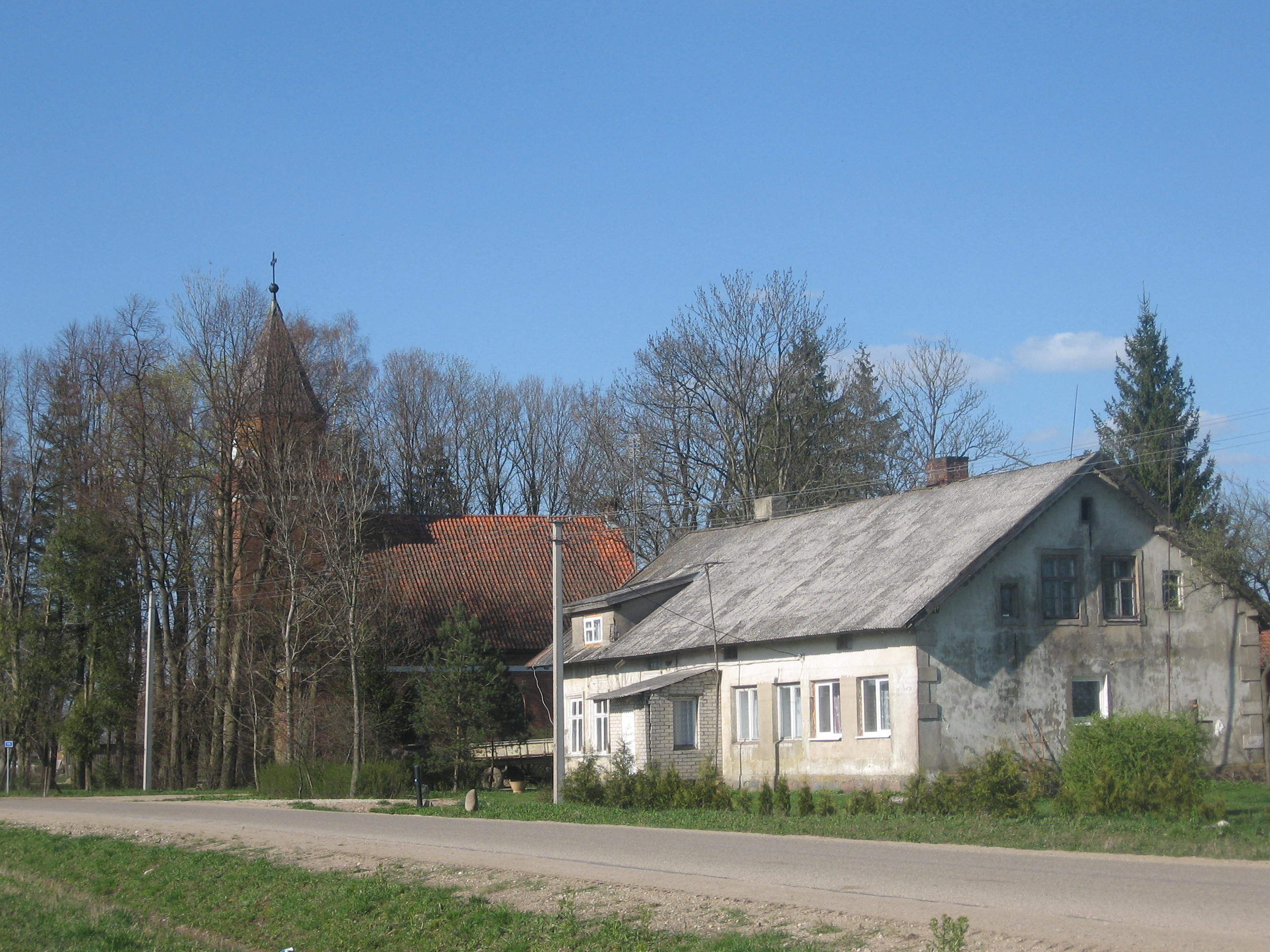 Ramučių kaimo centras